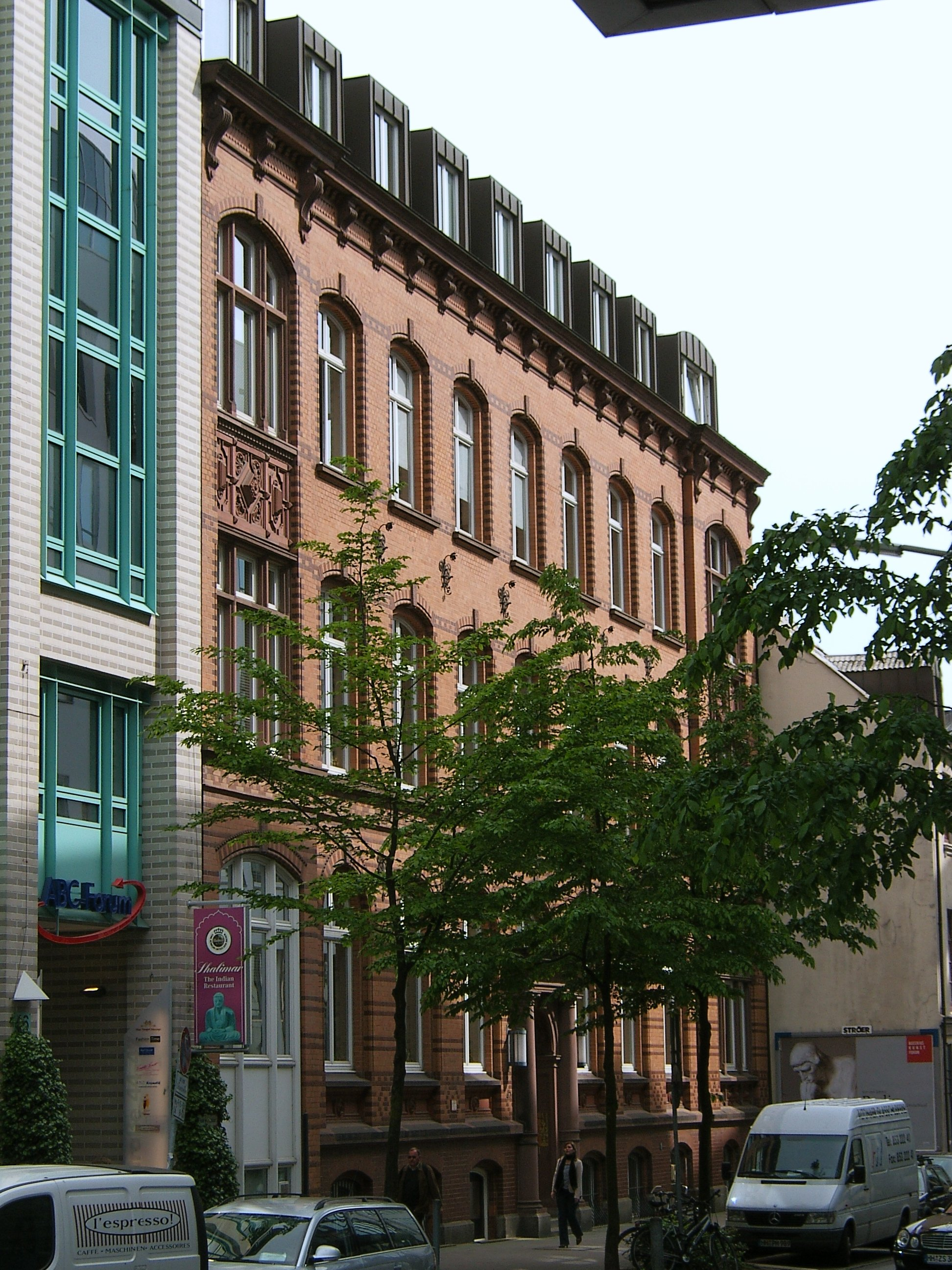 Hamburg, Innenstadt, ABC-Straße 47